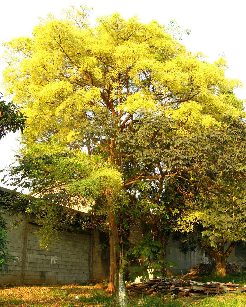 sementes maduras de araçá-d´água / Capitão pelado - Terminalia kuhlmannii